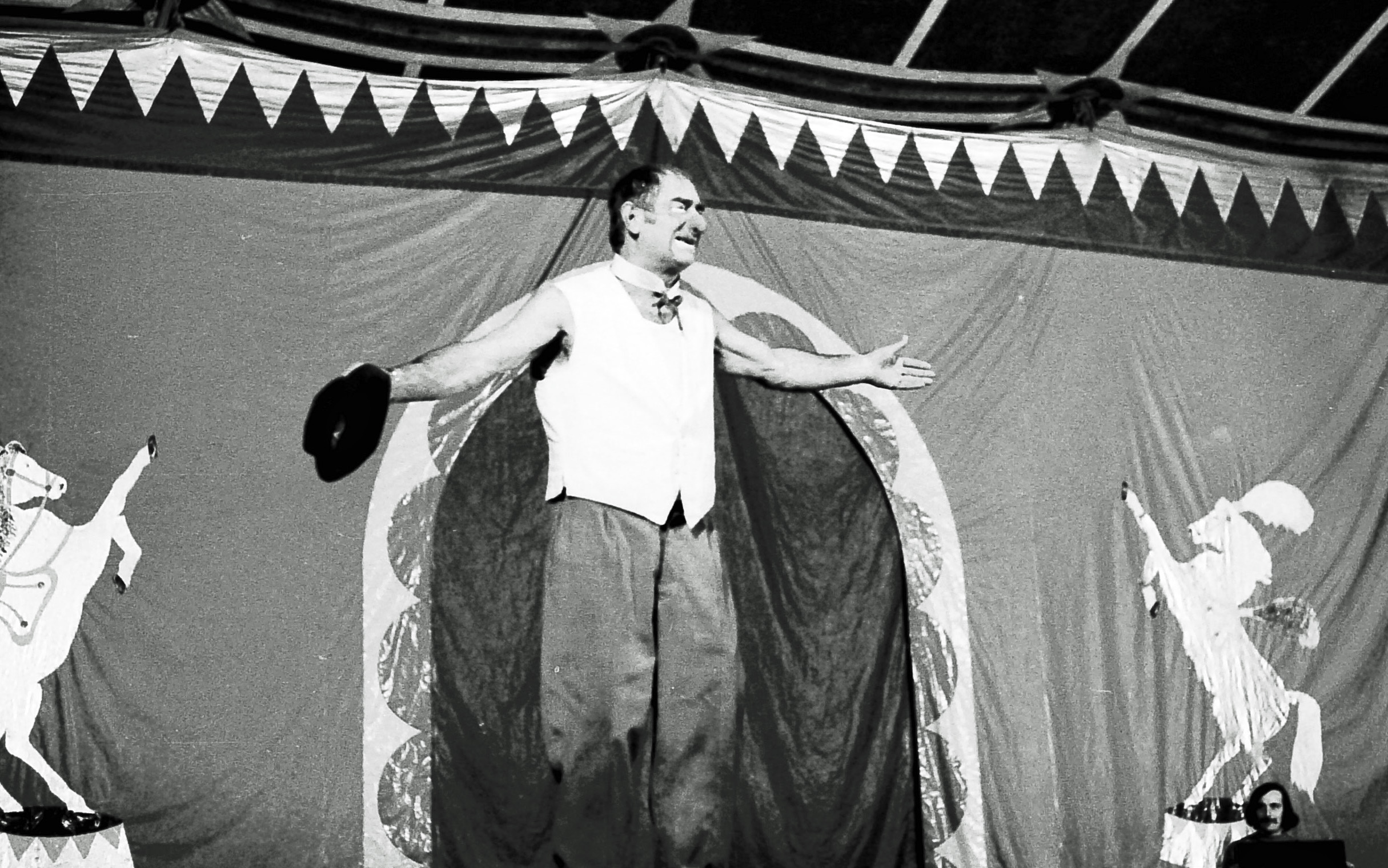 Le clown français Achille Zavatta en représentation à Quimperlé (Finistère, France) en février 1980.